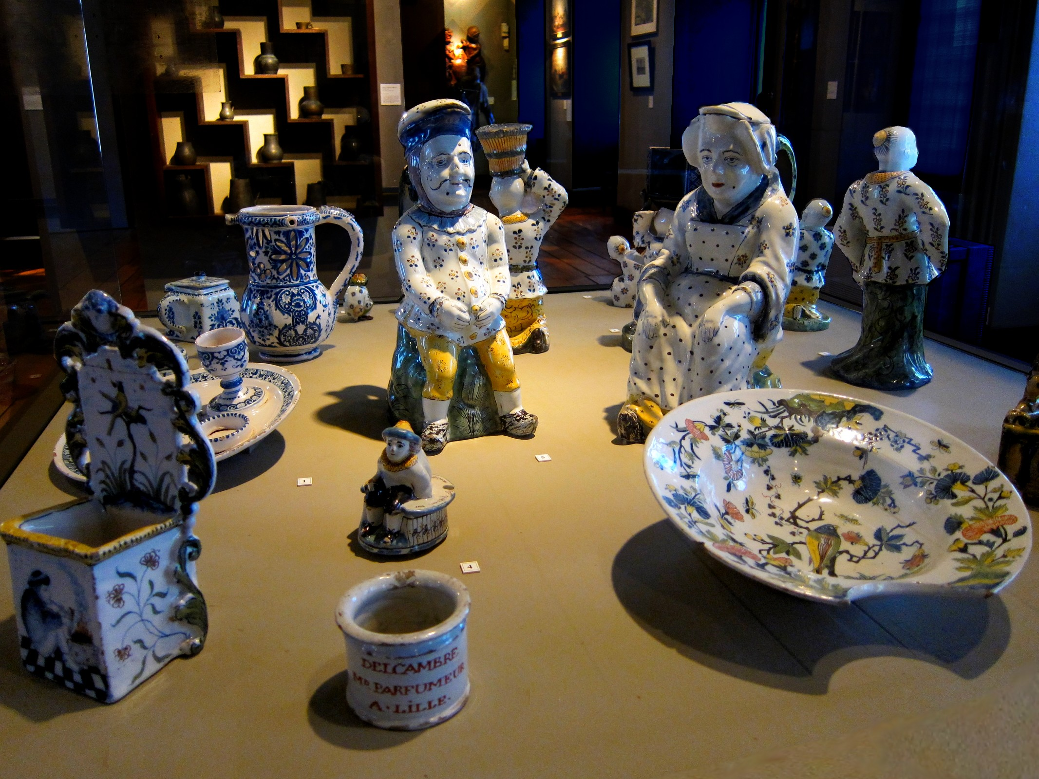 Porcelaines de Lille au musée de l'Hospice Comtesse de Lille.